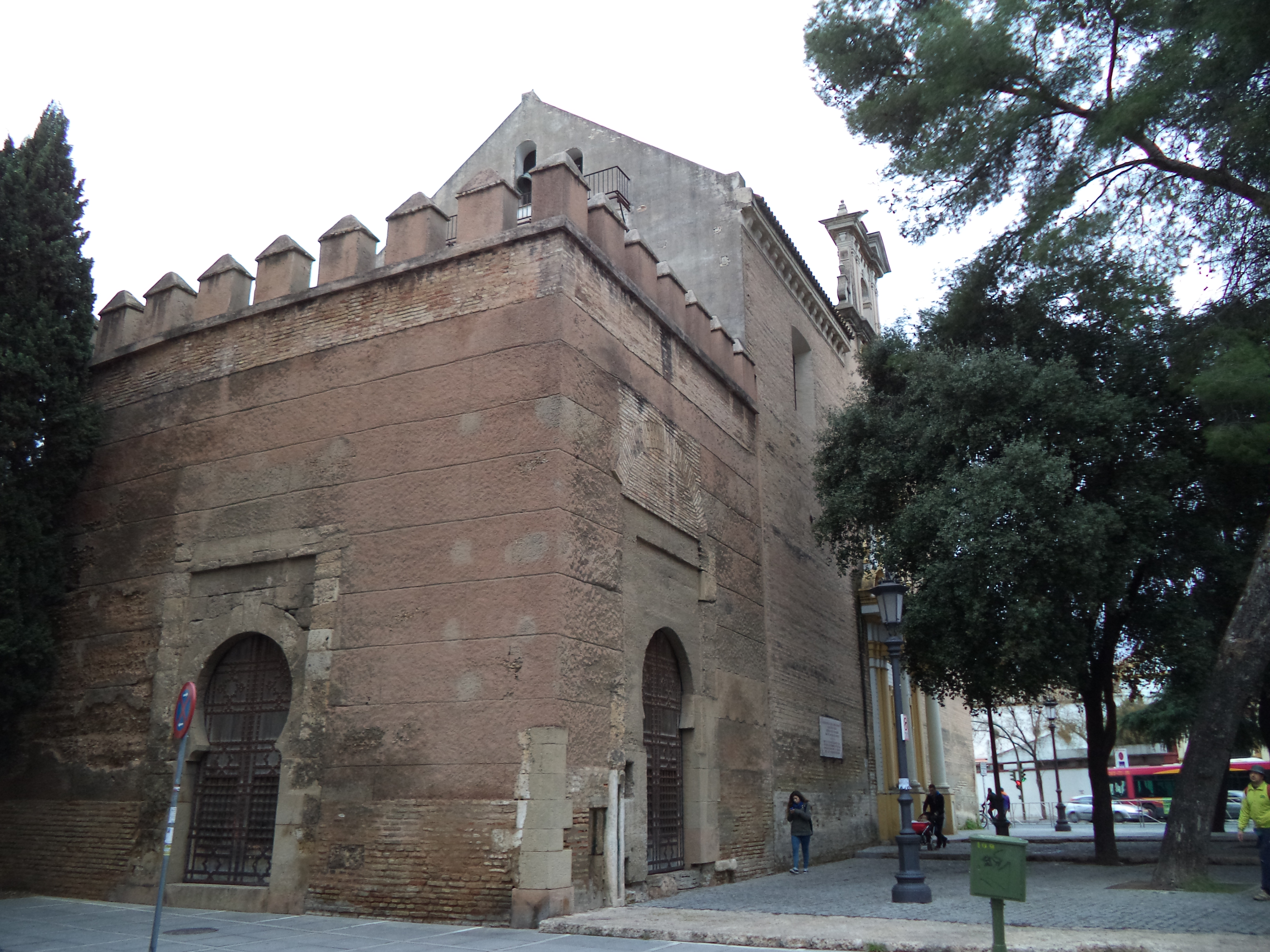 A la derecha, en segundo término aparece la Iglesia de San Hermenegildo, donde según la leyenda y la placa consagrada sobre la fachada escrita en latín y español fue encarcelado y ejecutado. A la Izquierda y en primer término, la Puerta de Córdoba, una de los 19 accesos que tuvo la ciudad, y una de las tres que se conservan.